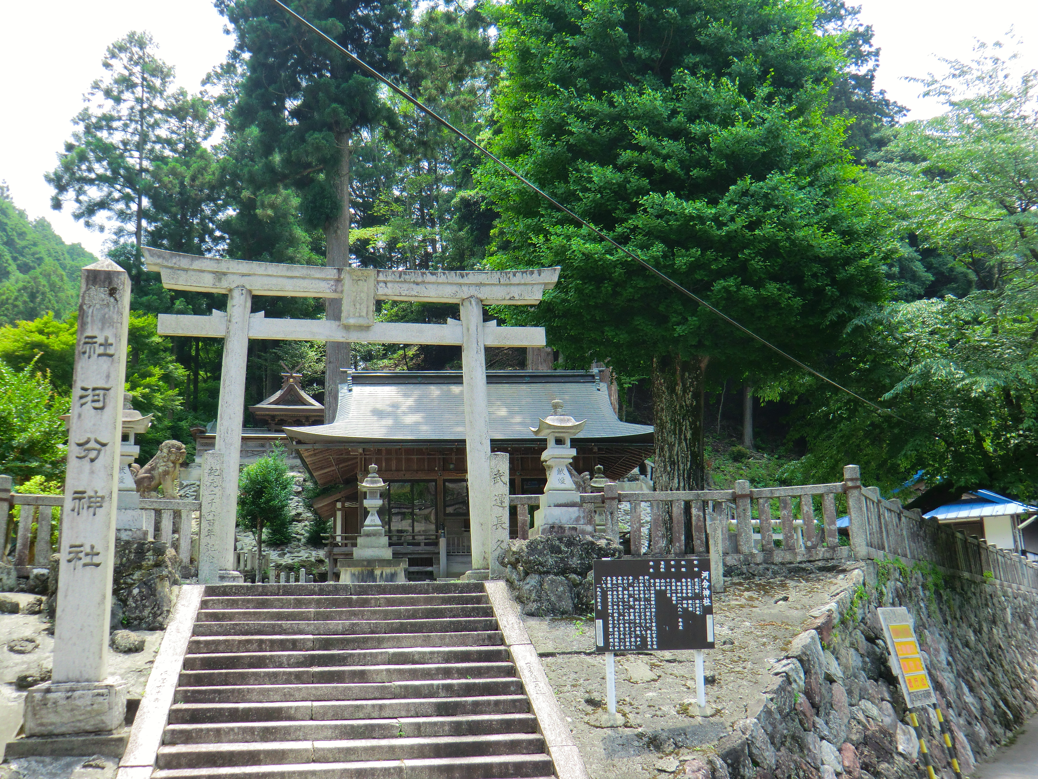 河分神社（黒滝村）